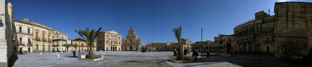 Piazza Carlo Maria Carafa - Novembre 2008